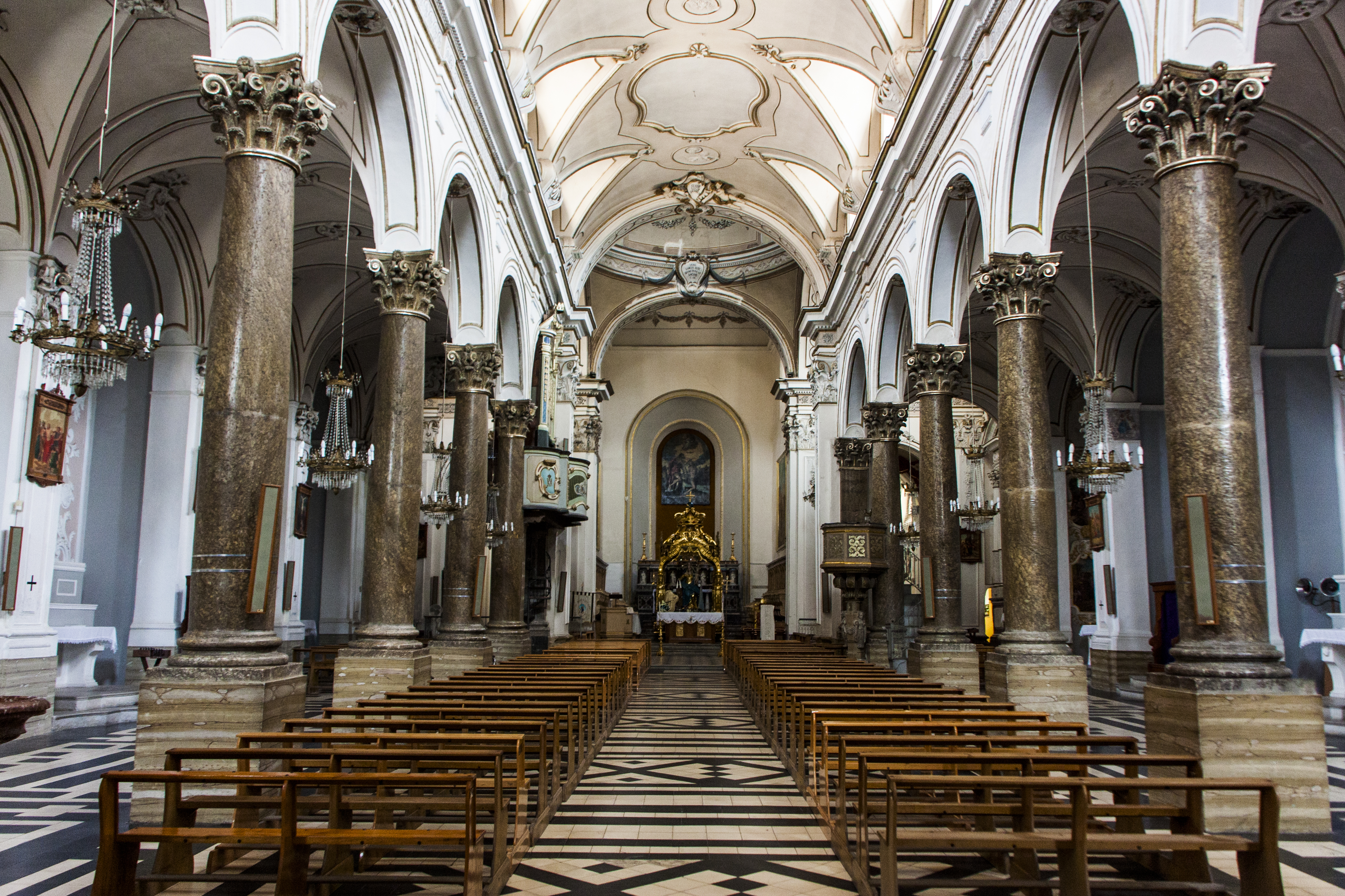 Chiesa Madre Leonforte - navata centrale This is a photo of a monument which is part of cultural heritage of Italy.